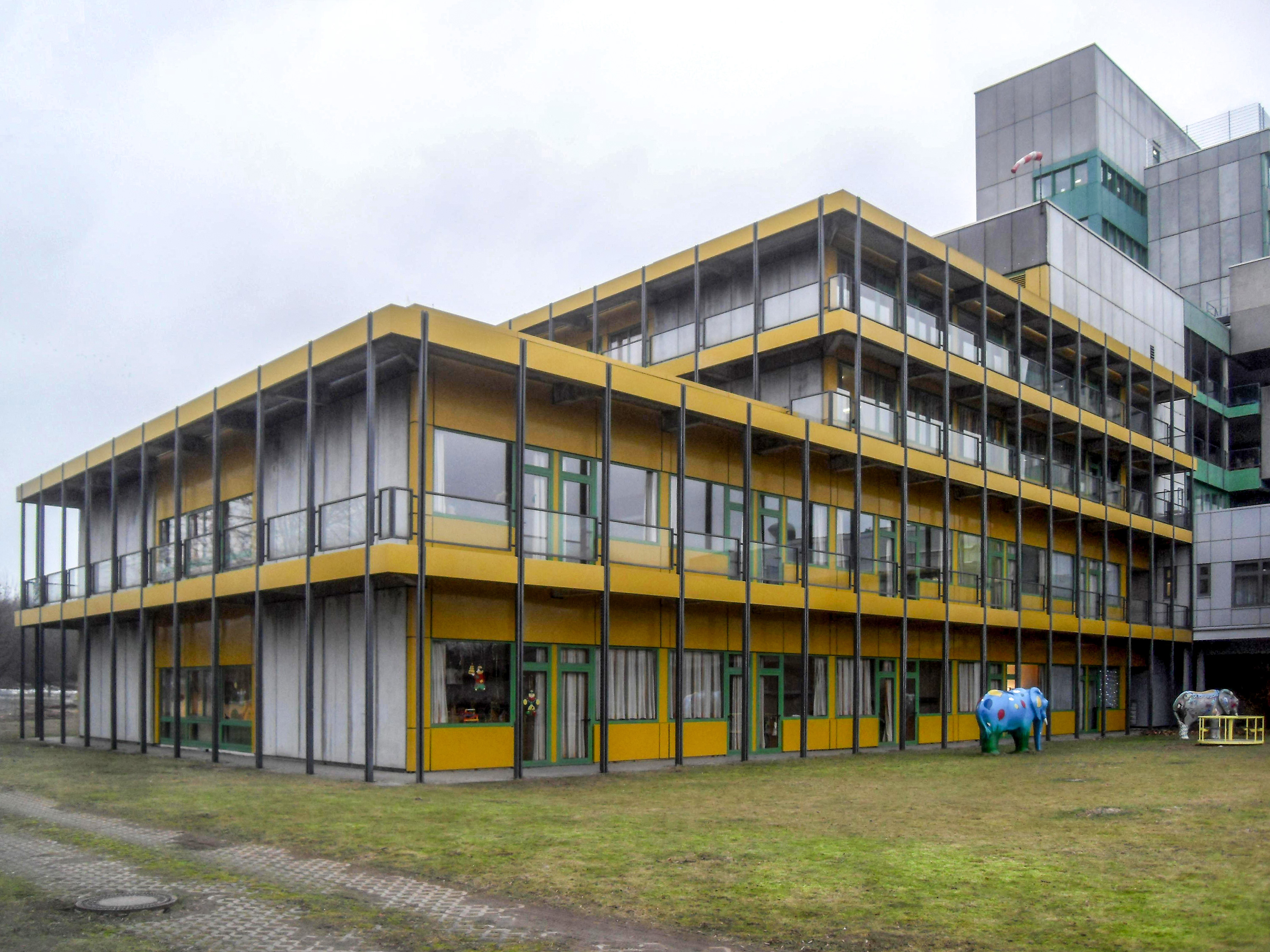 Die Kinderabteilung des Klinikums Worms in Rheinhessen in Rheinland-Pfalz (Deutschland)